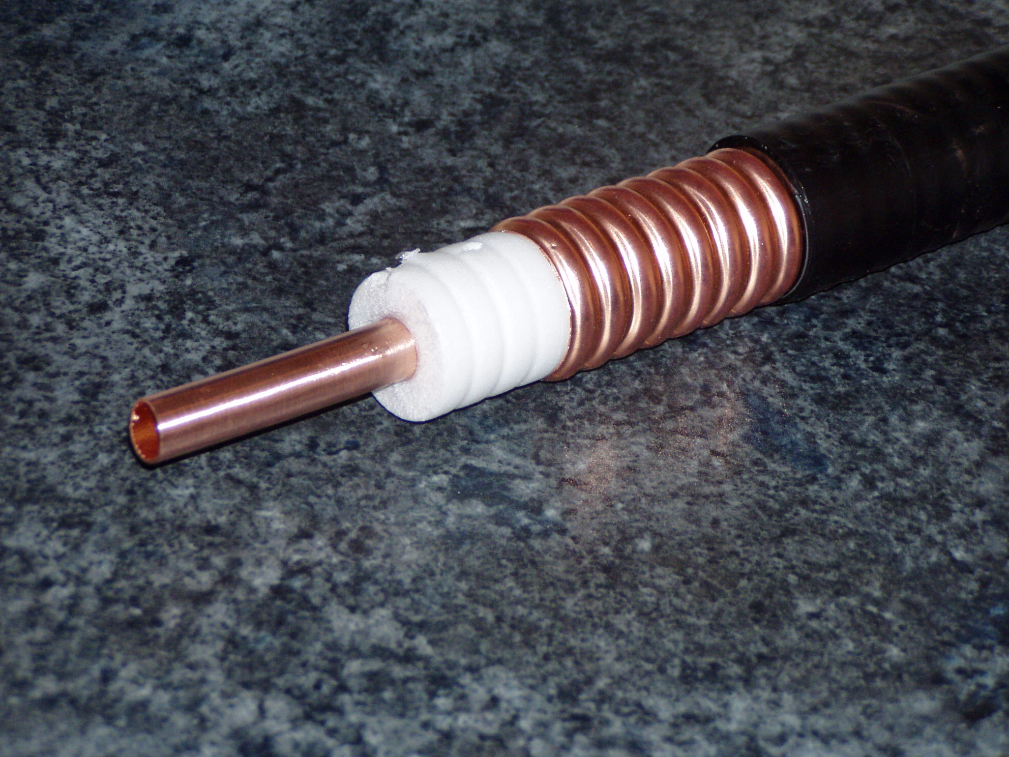 Das Koaxialkabel RFS CELLFLEX® LCFS114-50JA ist mit einem Durchmesser des Außenleiters von 1,5 Zoll schon für die Übertragung von sehr großen Leistungen geeignet.